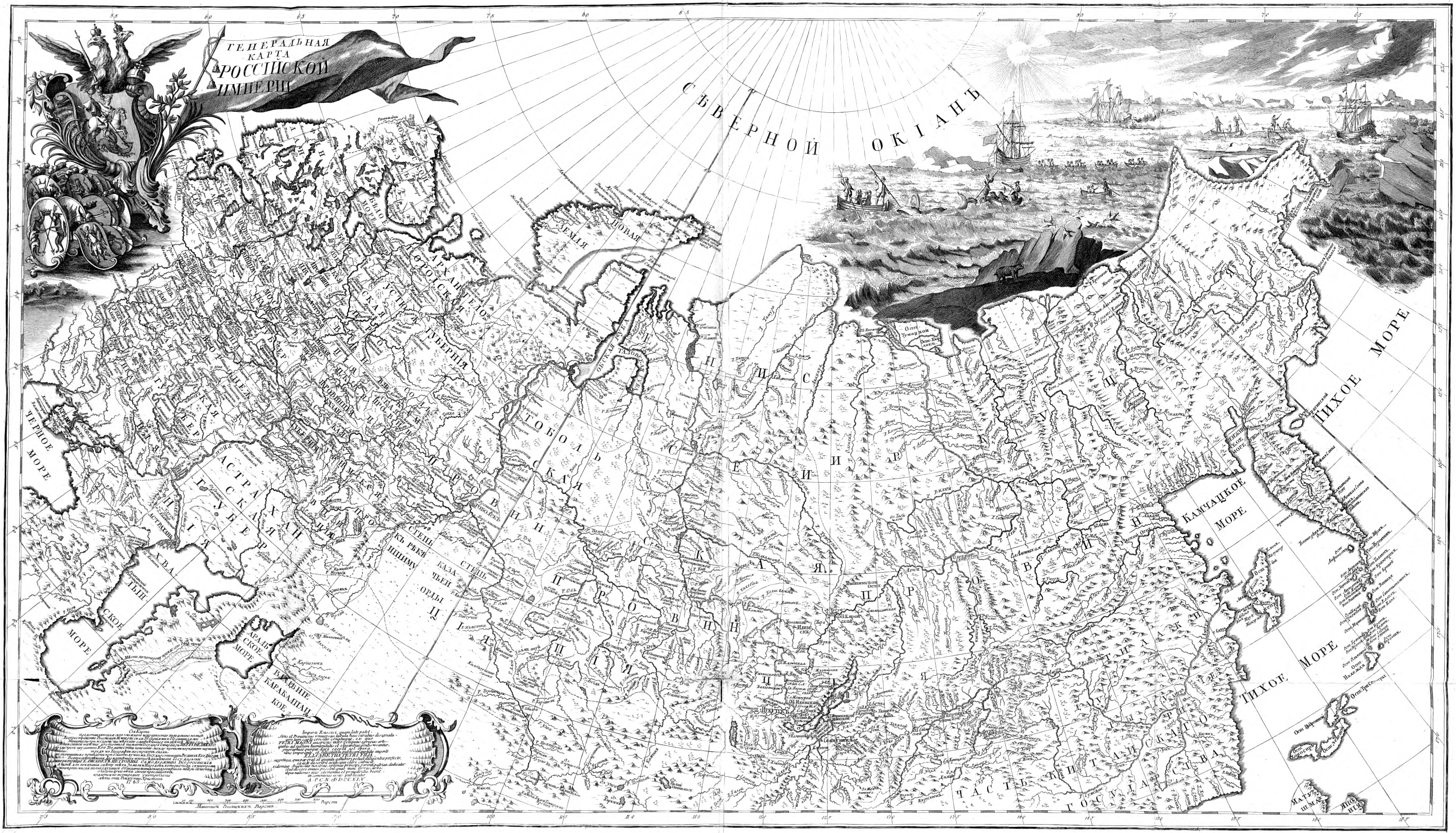 Карта 1745 года на основе результатов Великой северной экспедиции